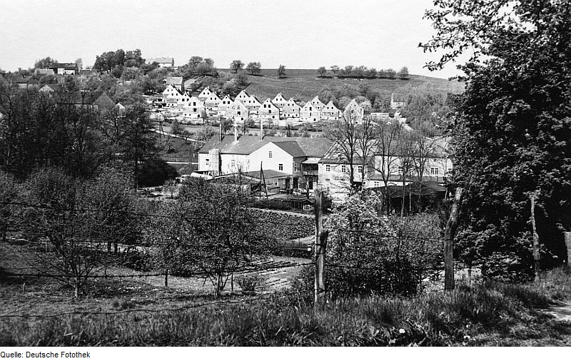 Original image description from the Deutsche FotothekTriebischtal-Robschütz. Blick ins Triebischtal auf das Talkumwerk, ehem.Papierfabrik